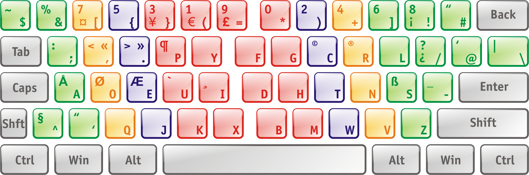 Dvorak Layout for programmers